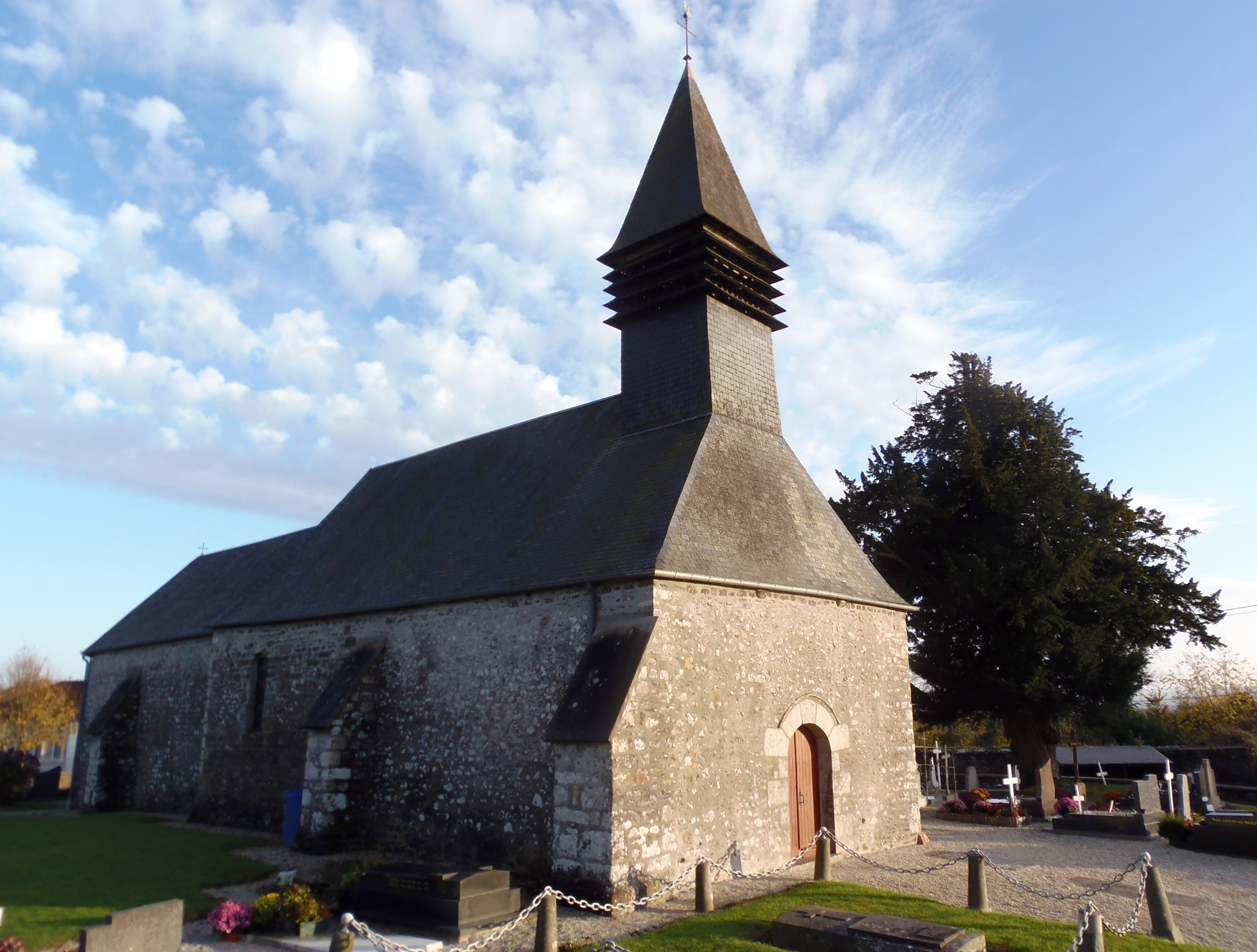 Le Mesnil-Herman (Normandie, France). L'église Saint-Pierre.